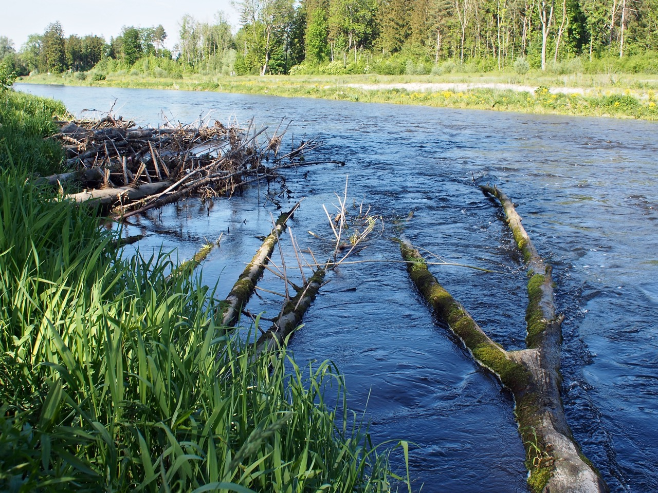 Augsburg: Landschaftsschutzgebiet „Wertachauen zwischen Inningen und Göggingen“; Baumverankerungen zum Schutz von Fischen